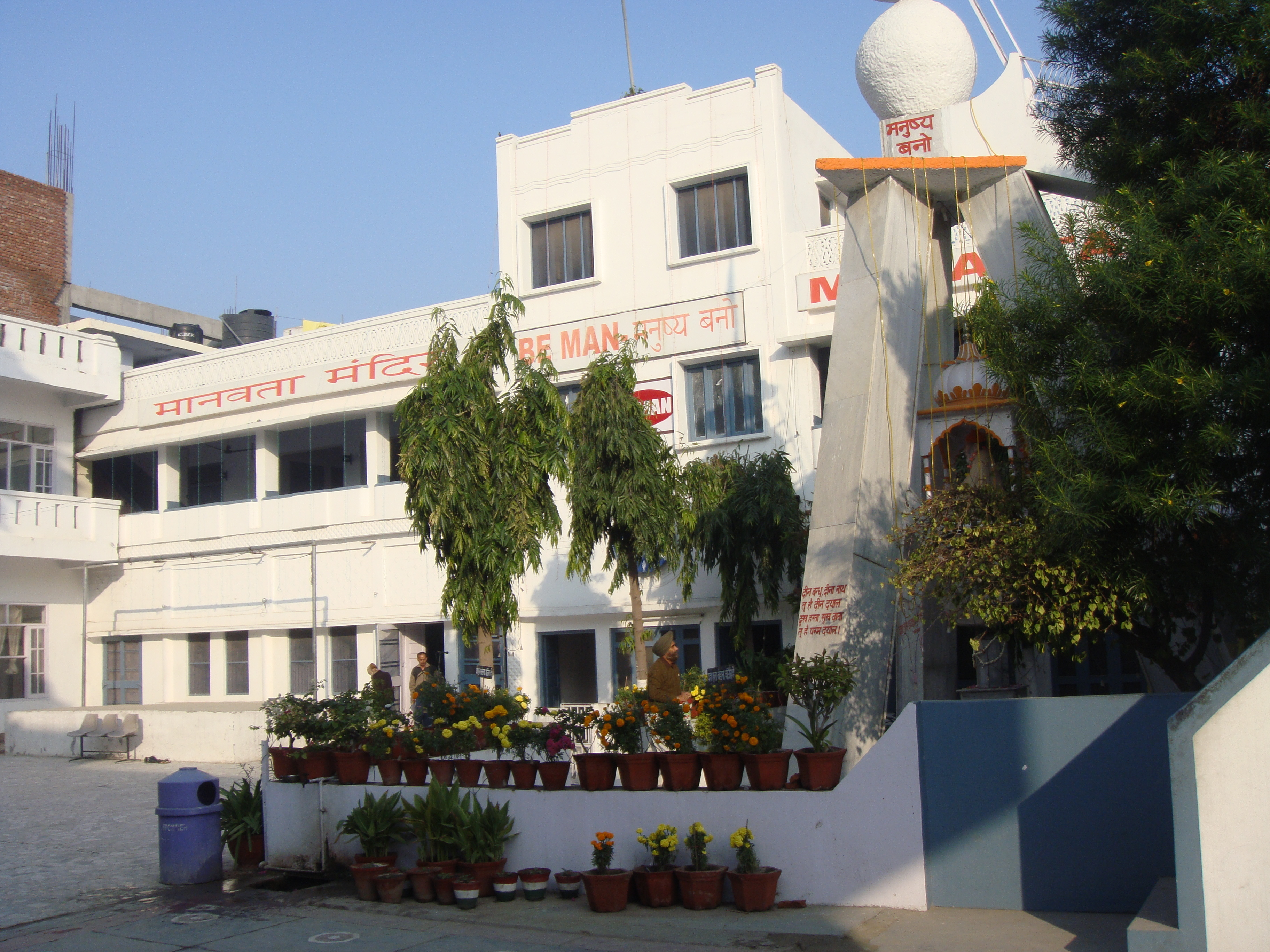 मैं इस फोटो का मालिक हूँ. यह फोटो मैंने अपनी यात्रा दिनाँक 17 और 18 नवंबर 2009 को मानवता मंदिर में खींची थी. इस फोटो की कोई कापीराइट नहीं है.